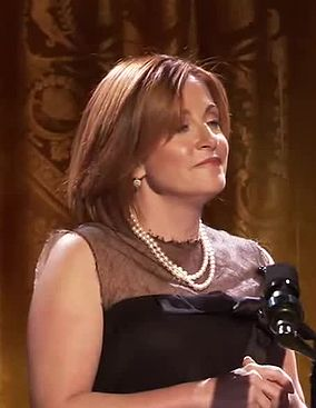 Michael Chabon & Ayelet Waldman Speak at the White House Poetry Jam- (4 of 8).webm